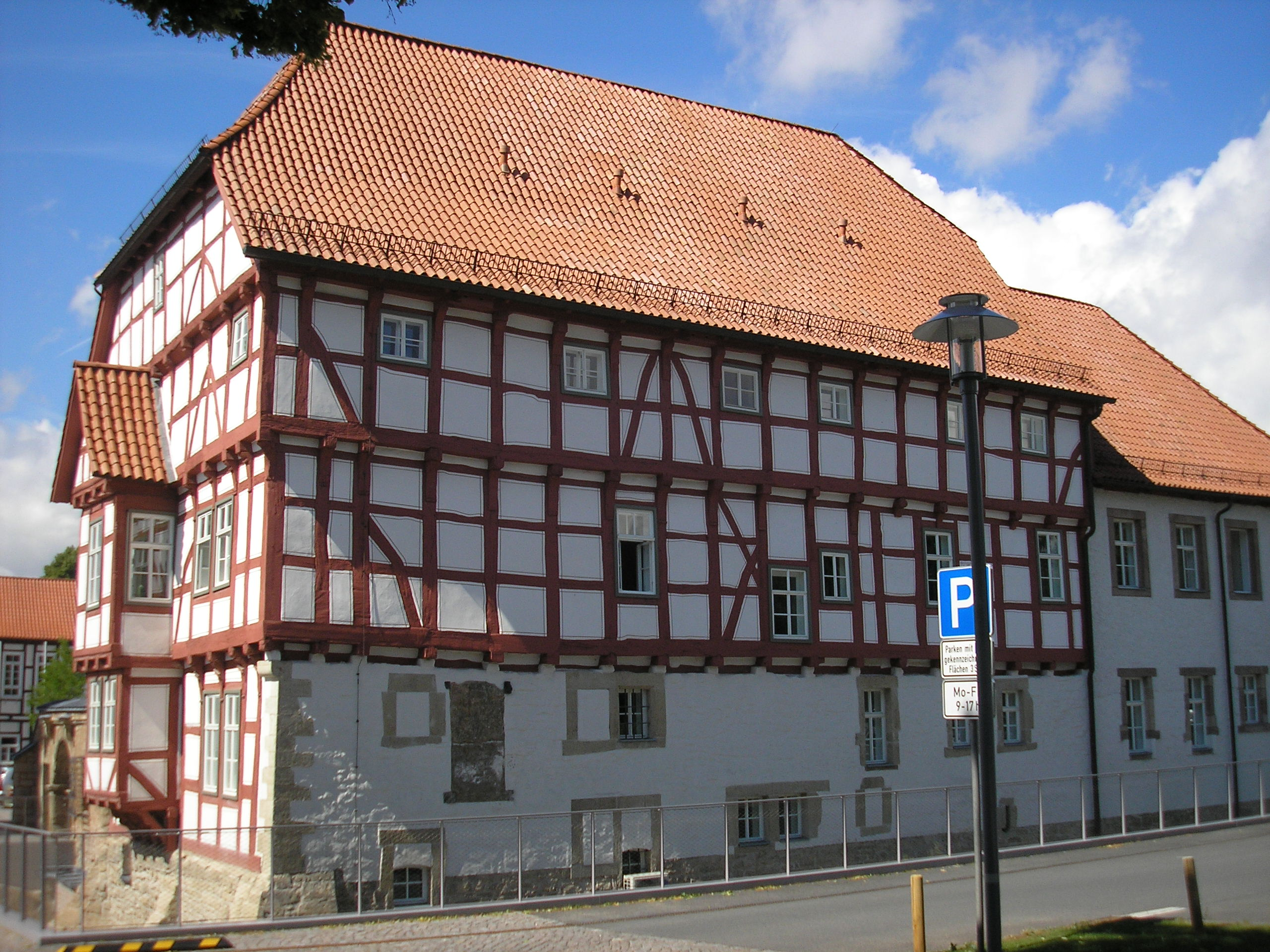 Rückansicht des Rathauses in Worbis (Eichsfeld).